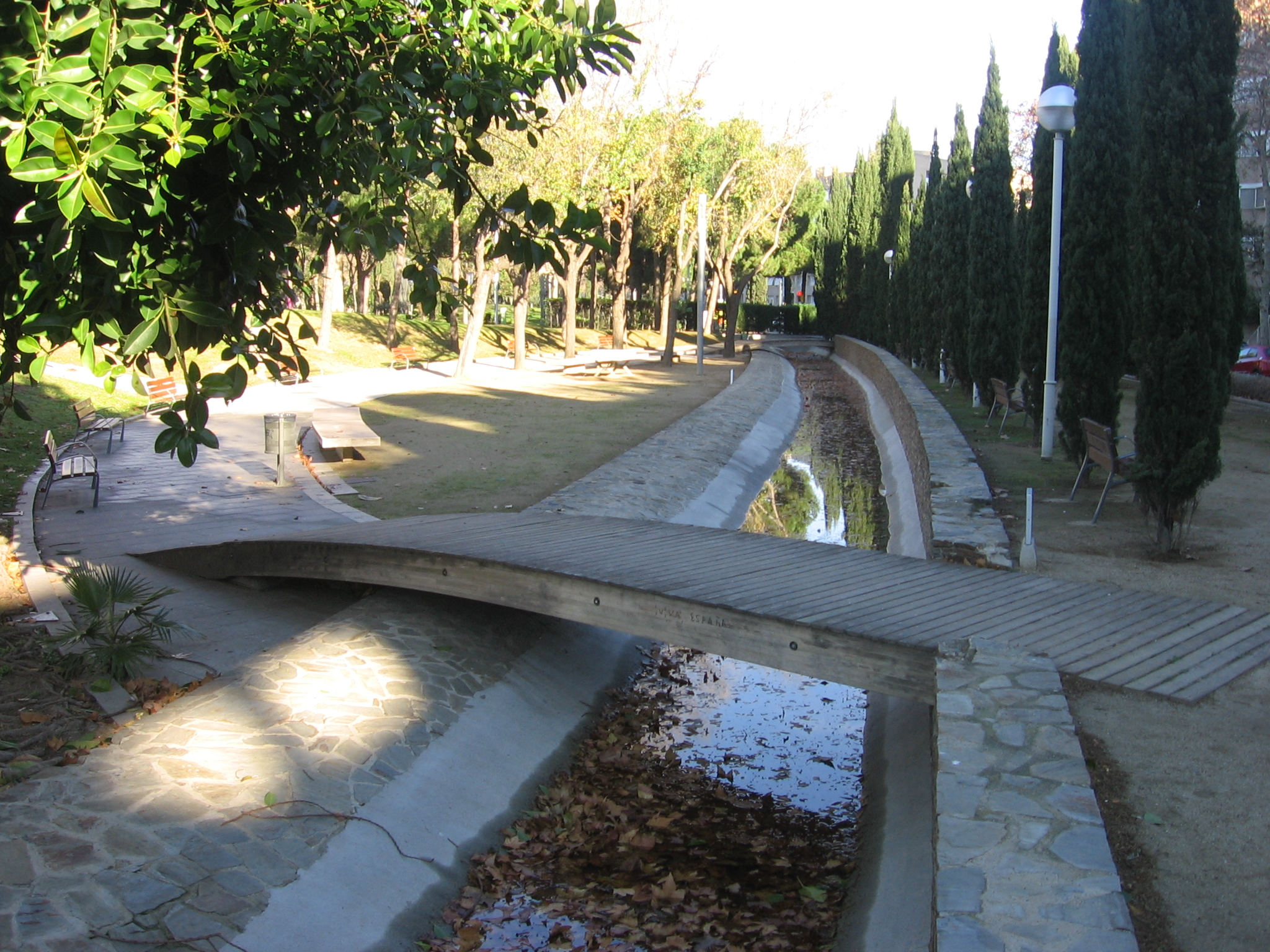 Parque de Carlos I.